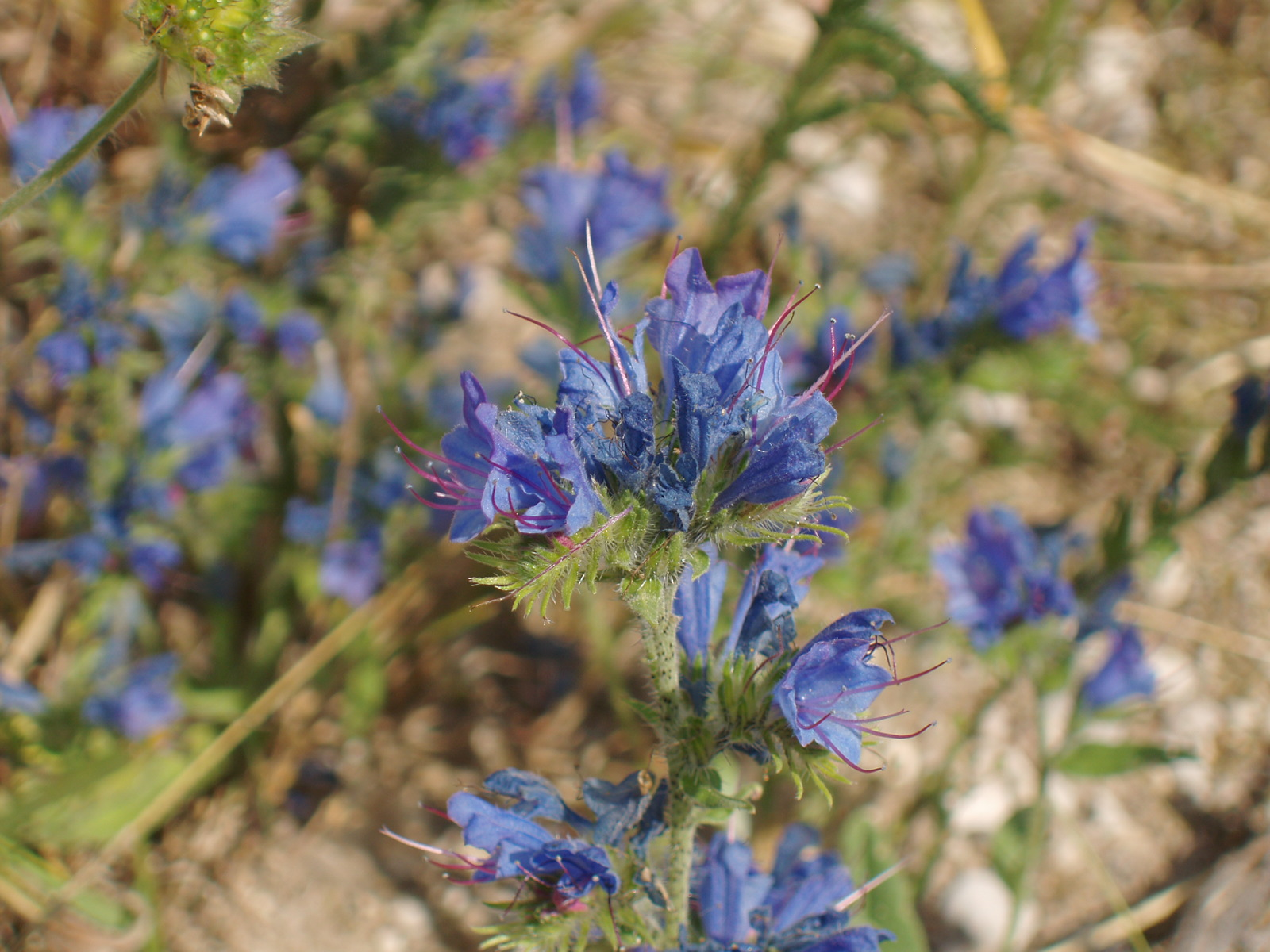 Echium vulgare